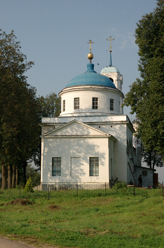 Храм Тихвинской иконы Божией Матери в селе Игнатово (Московская область, Дмитровский район).